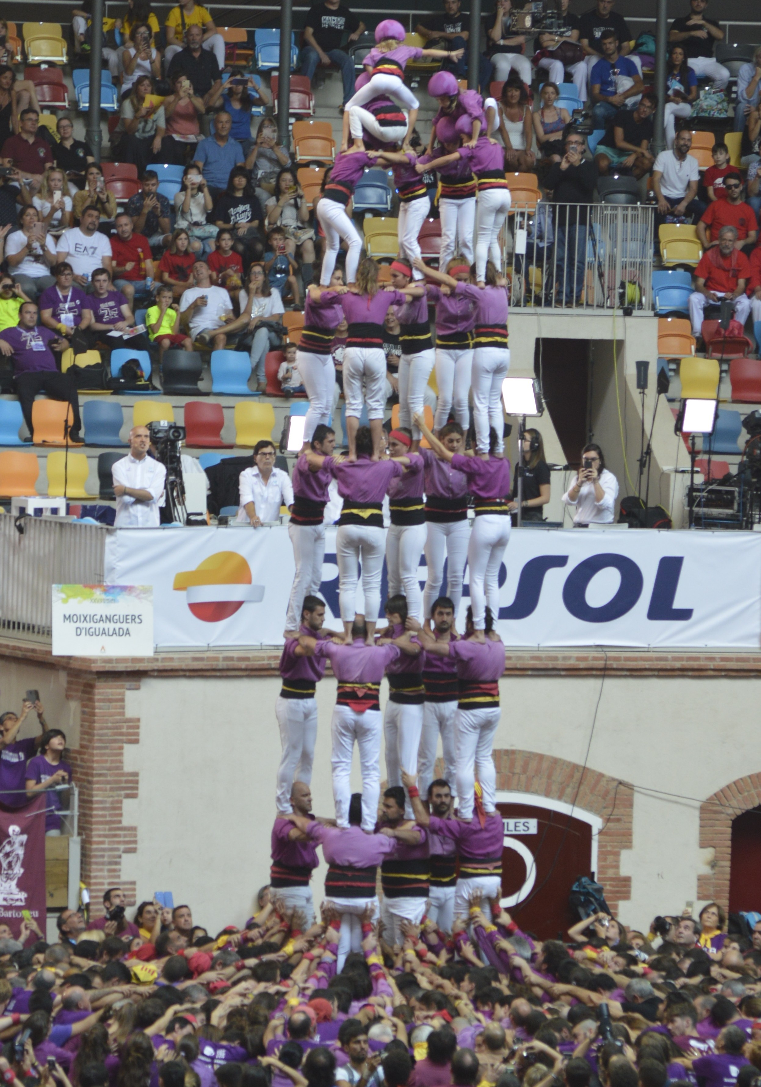 5 de 8 dels Moixiganguers d'Igualada durant la jornada de dissabte del XXVII Concurs de castells de Tarragona